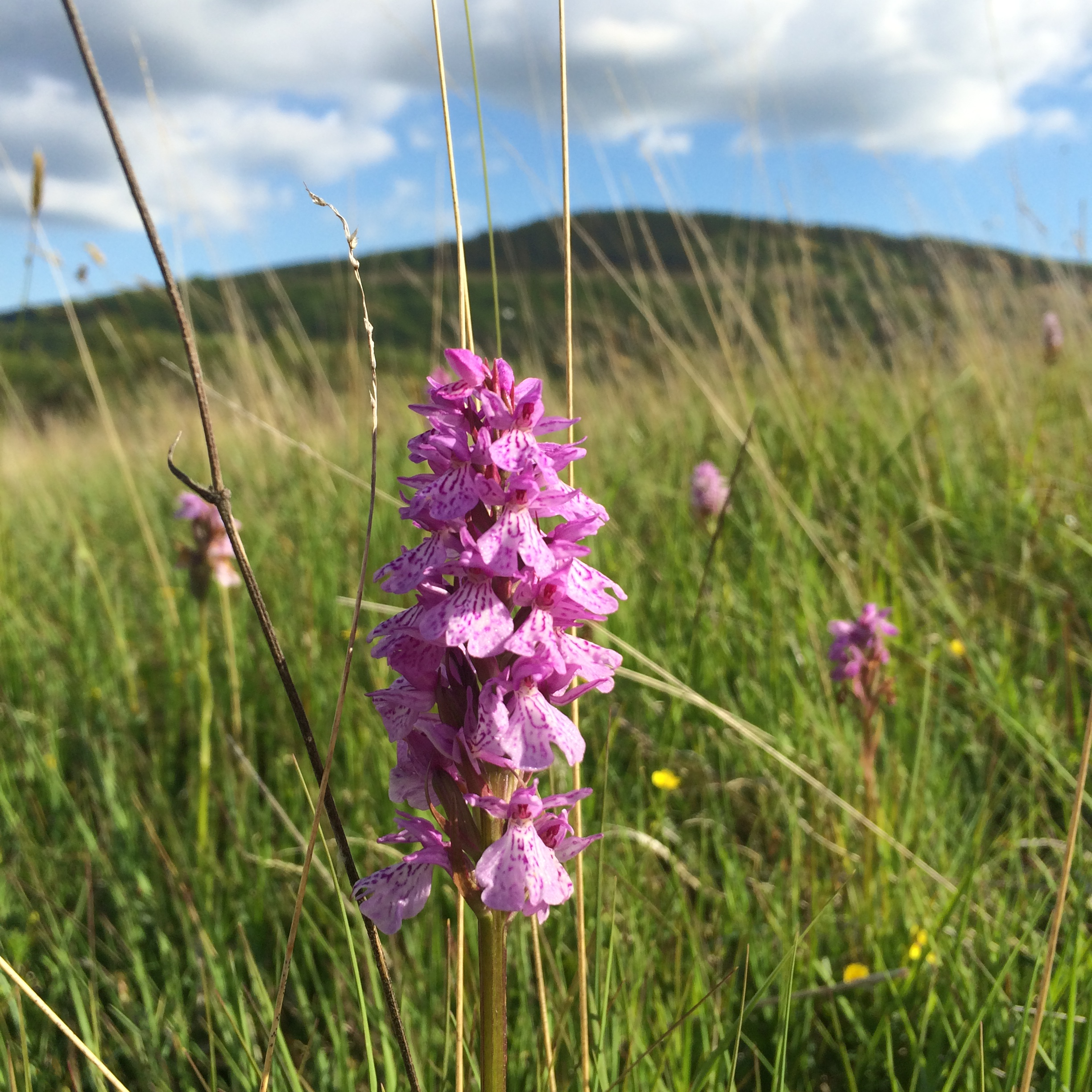 Tegeirian brych, ger Cwm Glo, Heolgerrig, Merthyr Tudful.